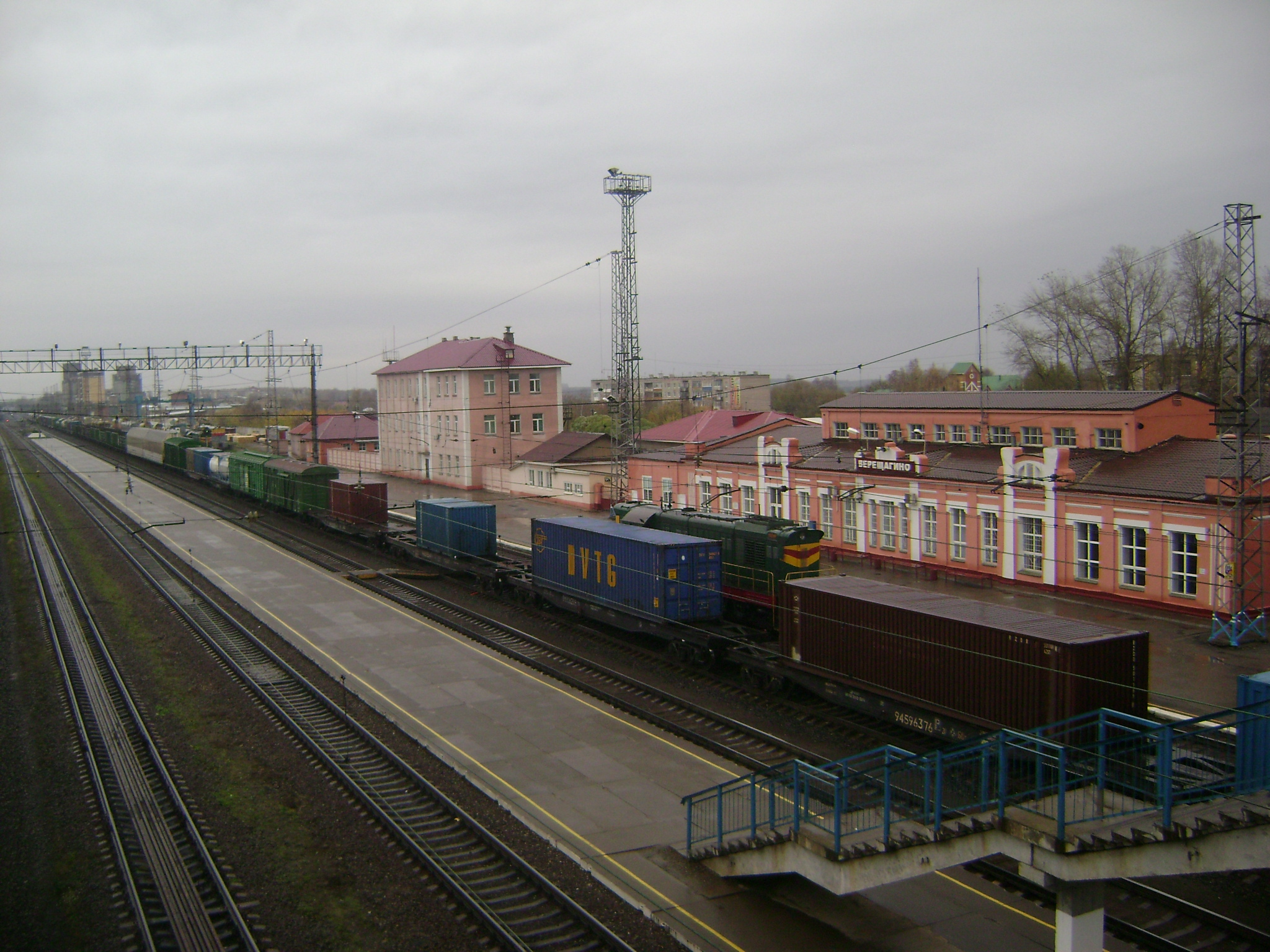 Станция Верещагино Свердловской ж/д